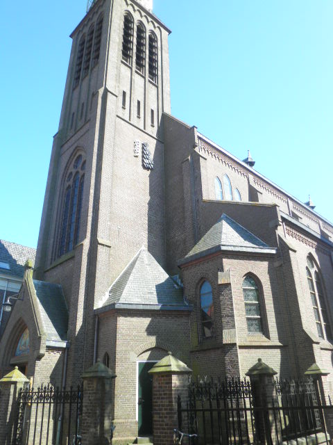 Franciscus Xaverius kerk, rijksmonument vanwegen onderdelen van de kerk.